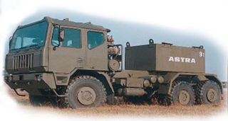 Autocarro pesante 6x6, esercito italiano